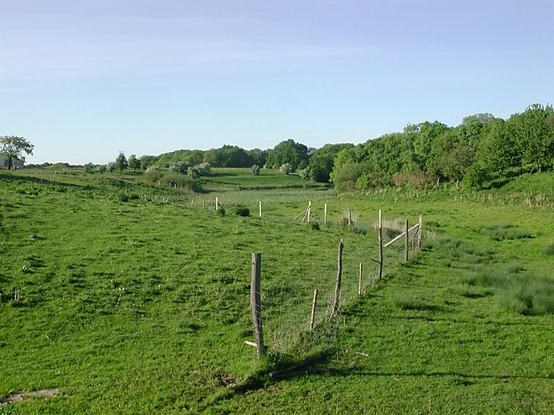 Hohenfinow